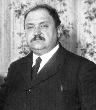 Constant Verlot, député des Vosges. Bibliothèque nationale de France, département Estampes et photographie